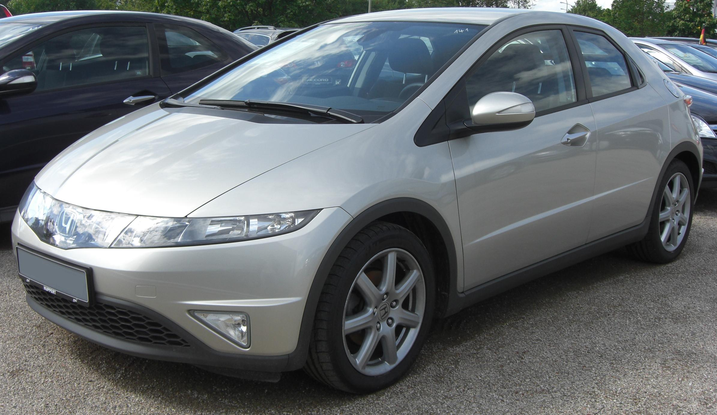 Honda Civic